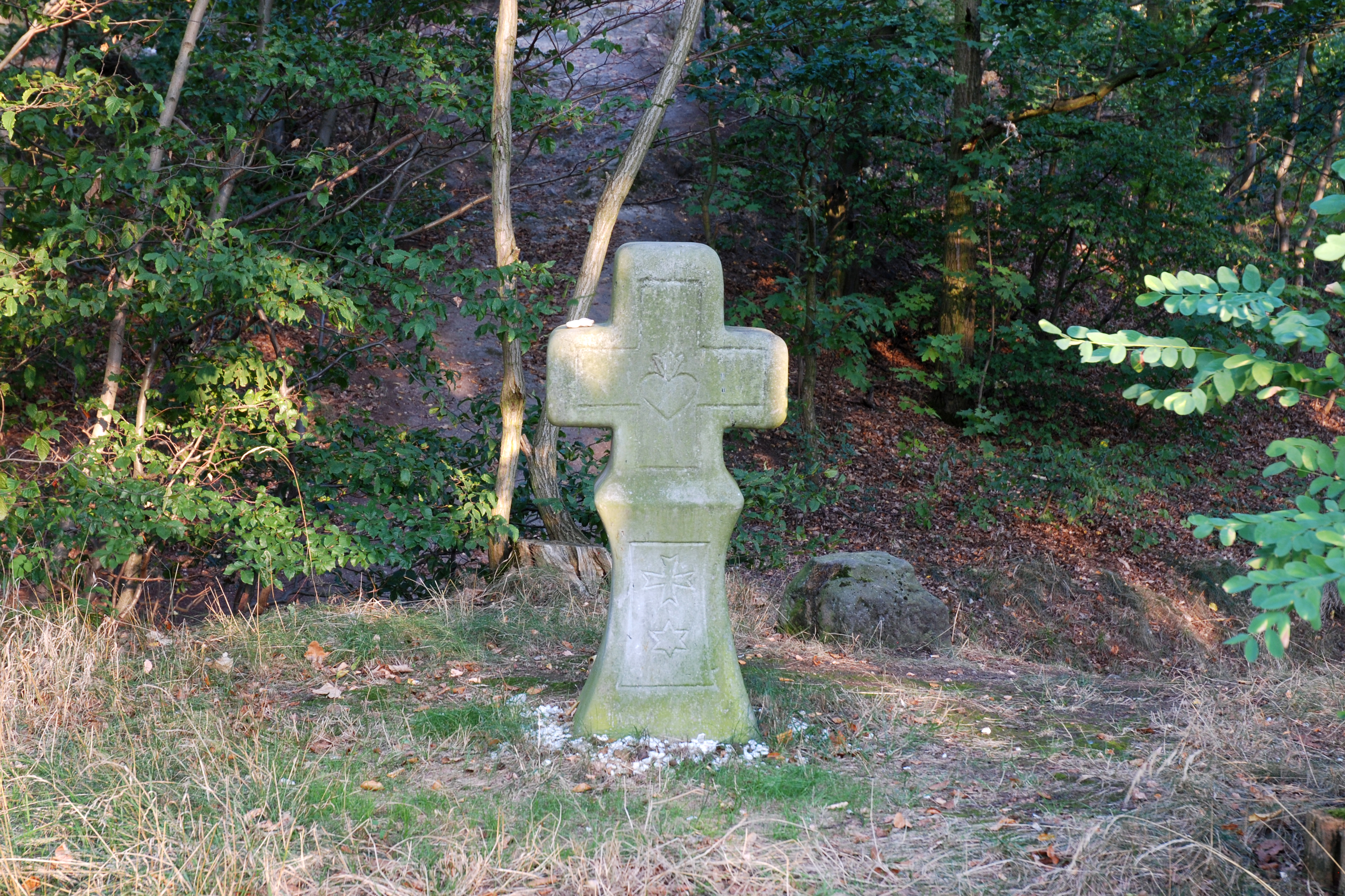 Pamětní kříž v Karlových Varech – Drahovicích jako upomínka na původní smírčí kříž